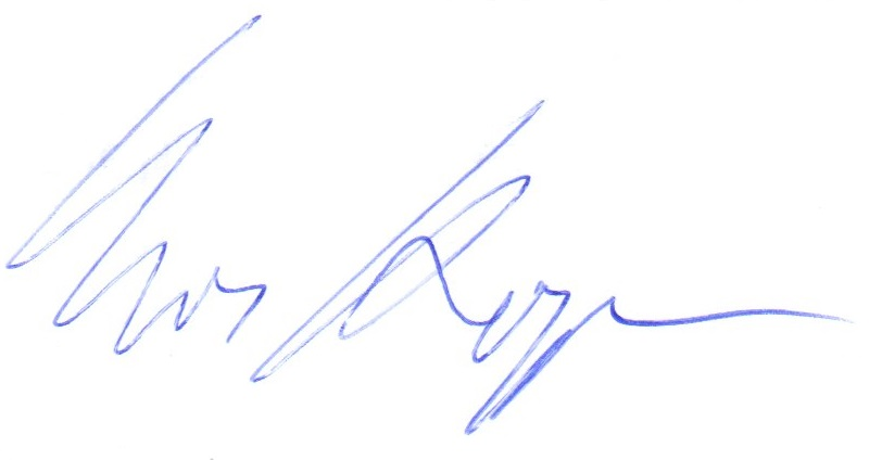 Uwe Hoppes Unterschrift